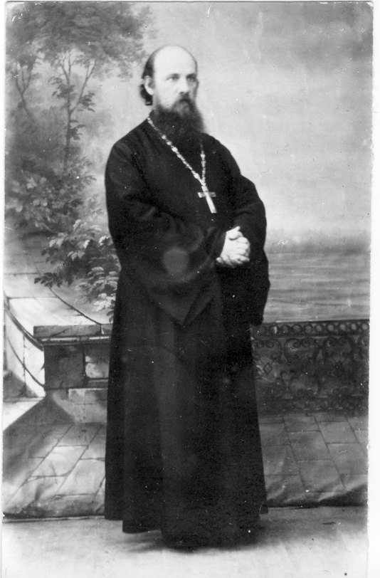 Протоиерей Александр Евменьевич Левковский. 1920-е годы.